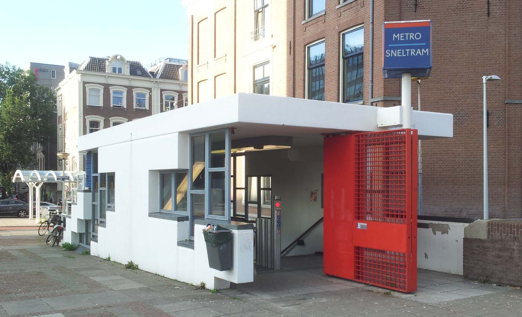 Een van de ingangen van het ondergrondse metrostation Weesperplein: bij de Spinozastraat en de Sarphatistraat.